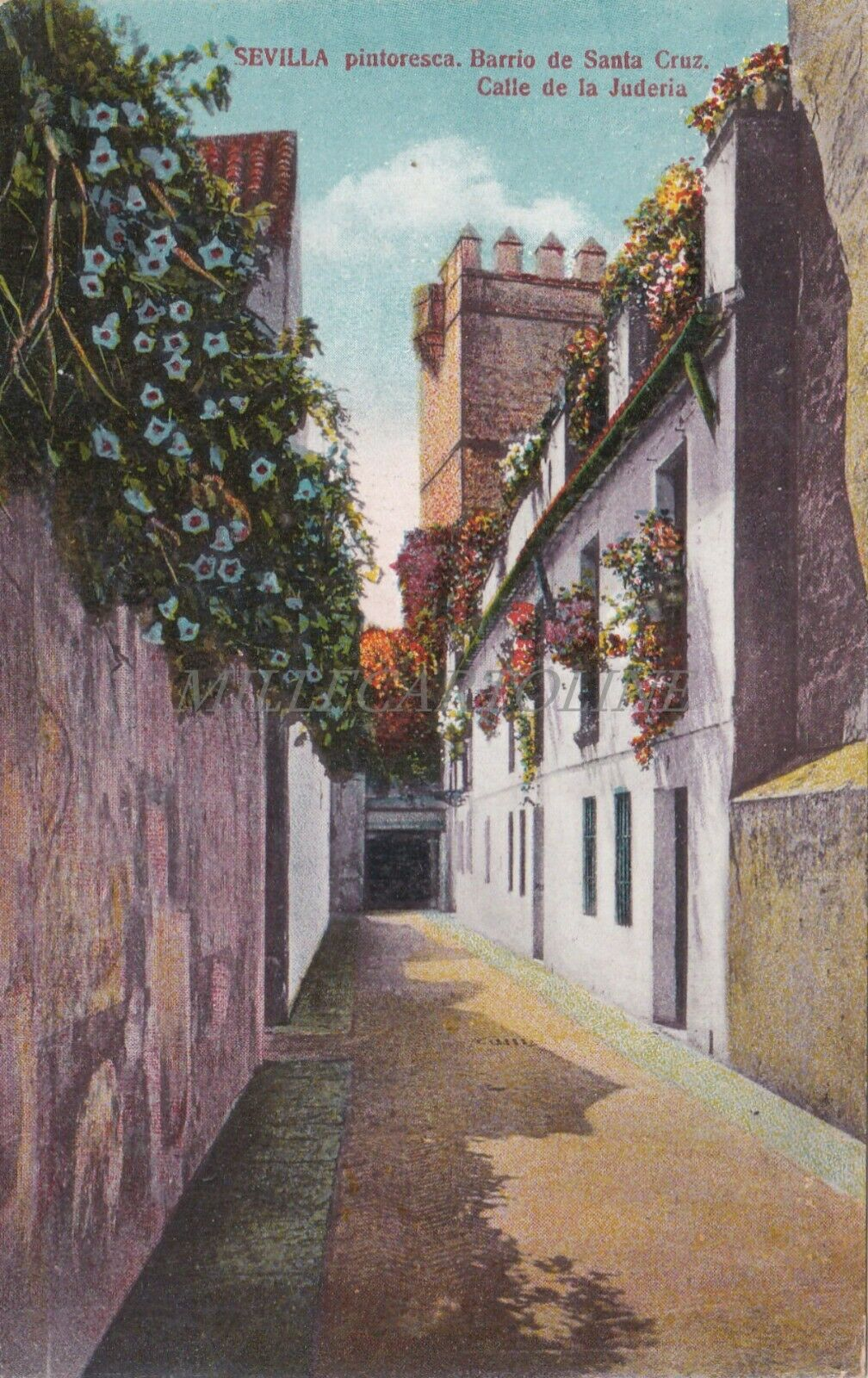 Postigo de la torre del Agua de Sevilla, s. XII, puerta de la muralla de la ciudad almohade. En callejón de la Judería, situada en las inmediaciones del Alcázar.